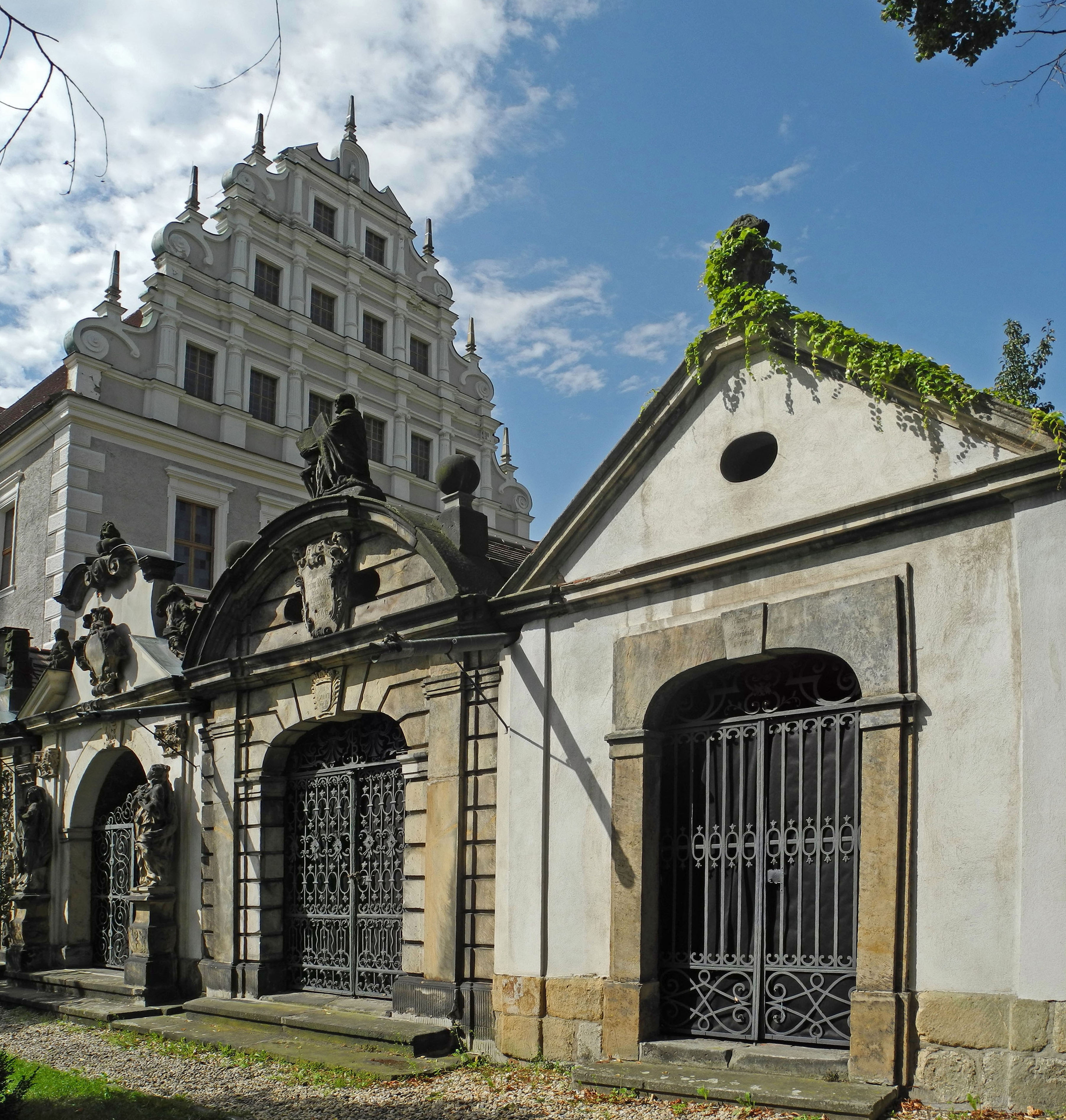 Klosterhof am Franziskanerkloster in Zittau, jetzt Kulturhistorisches Museum: Grufthäuser Nr. 5 bis 7